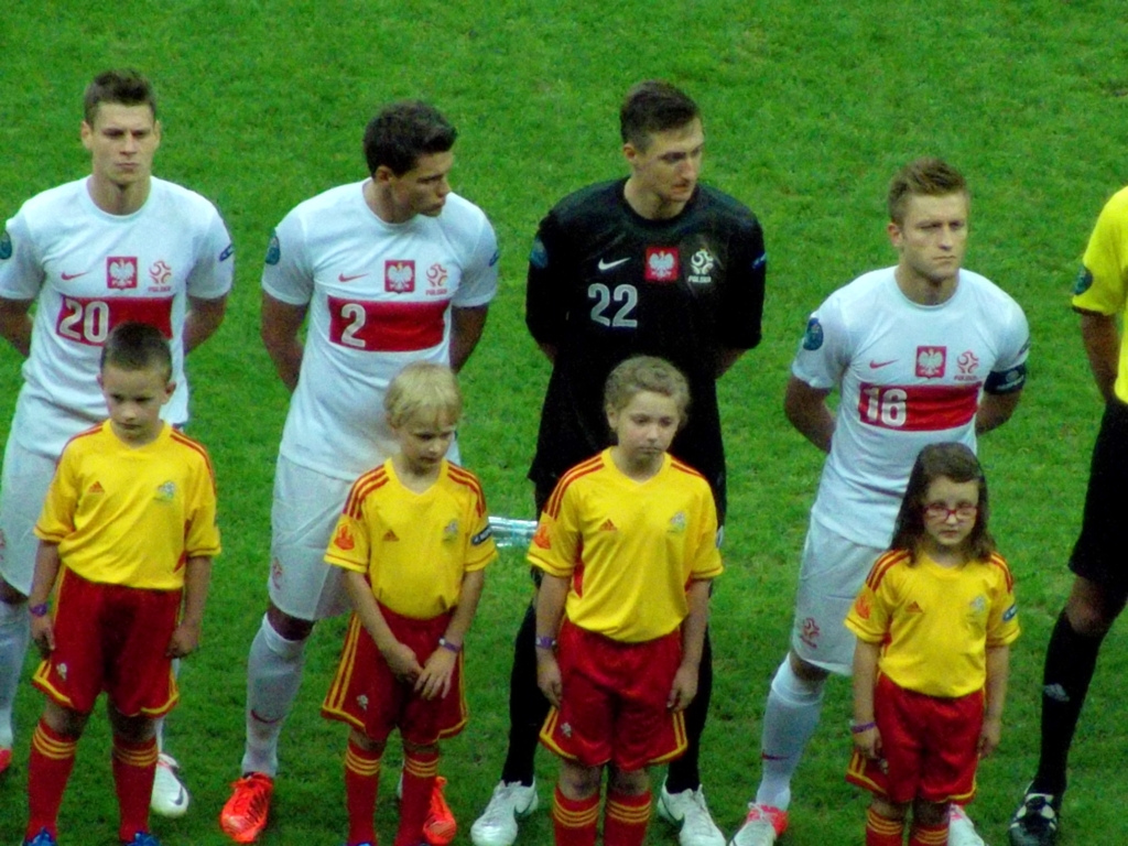 Zdjęcie zrobione w piątym dniu UEFA Euro 2012 w Warszawie, marszu rosyjskich kibiców i meczu Polska-Rosja.